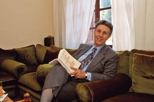 Maghnia-algeria